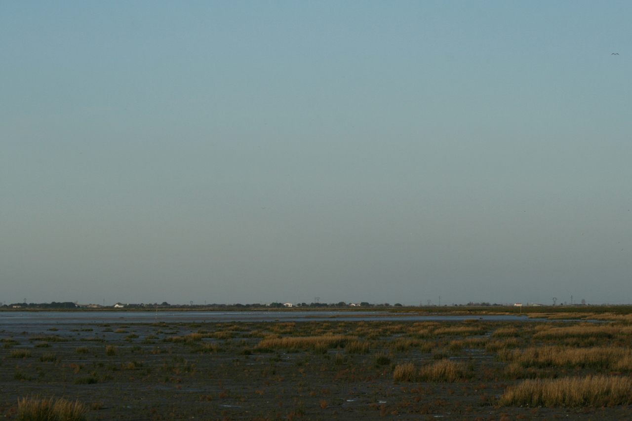 Reserve naturelle baie de l'Aiguillon